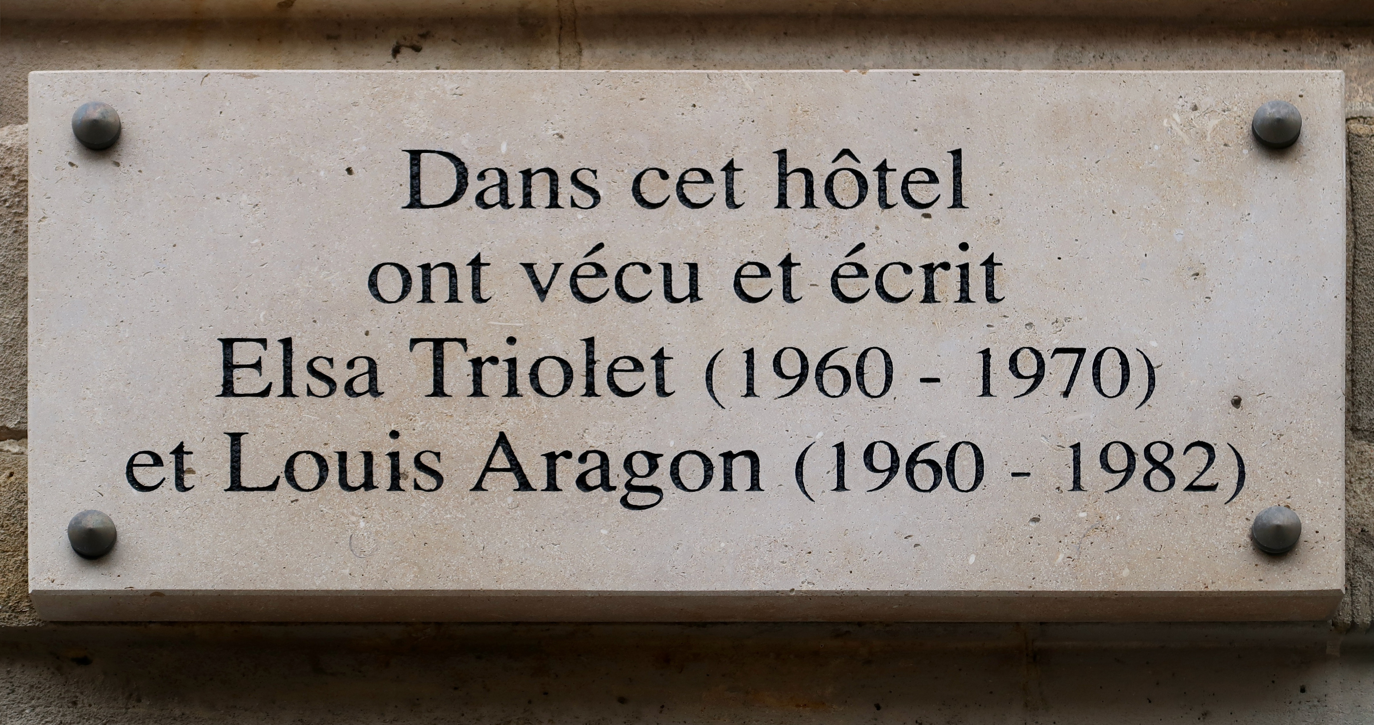 Plaque en hommage à Elsa Triolet et Louis Aragon, 56 rue de Varenne (Paris, 7e).